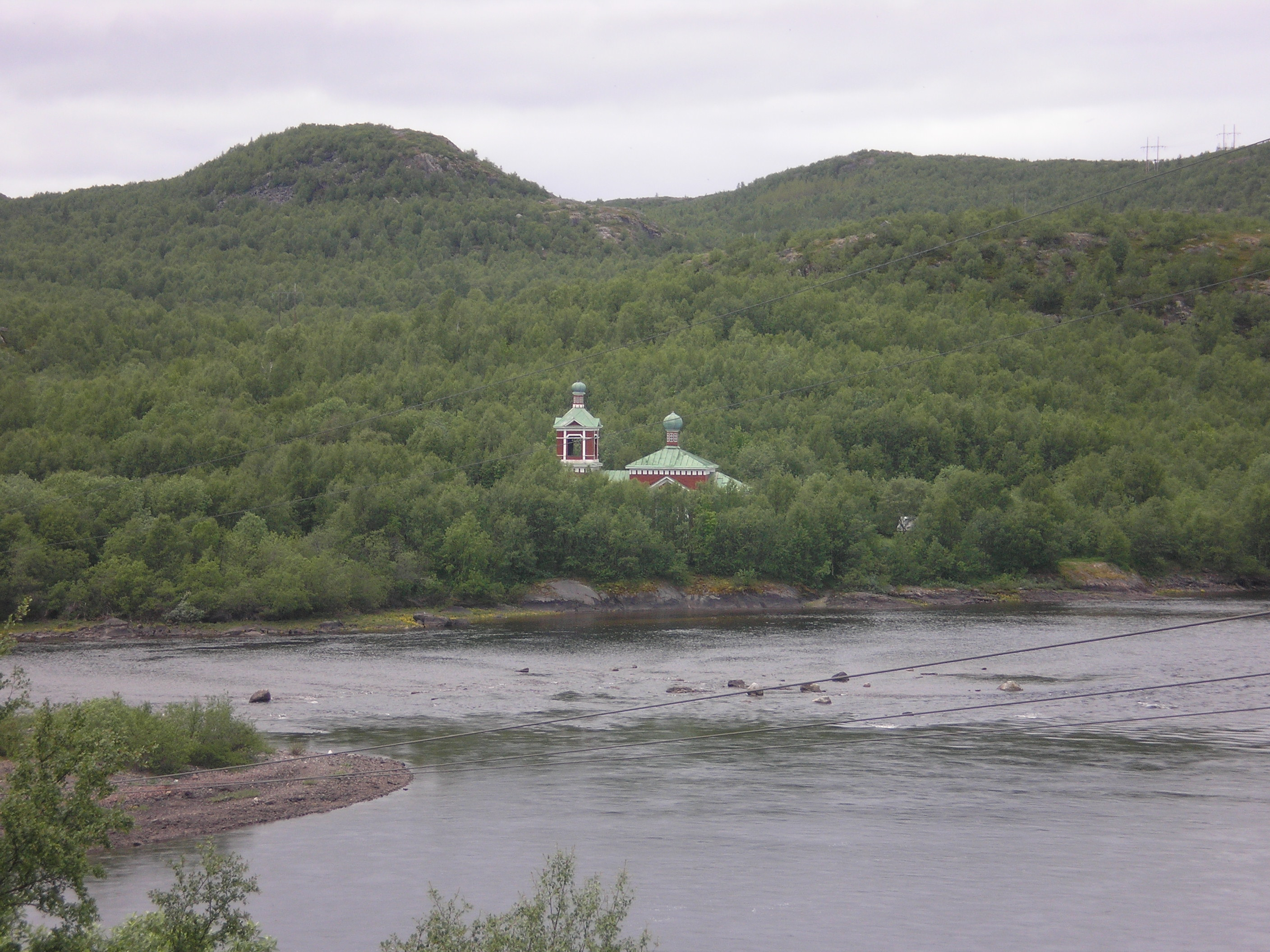 Борисоглебская церковь